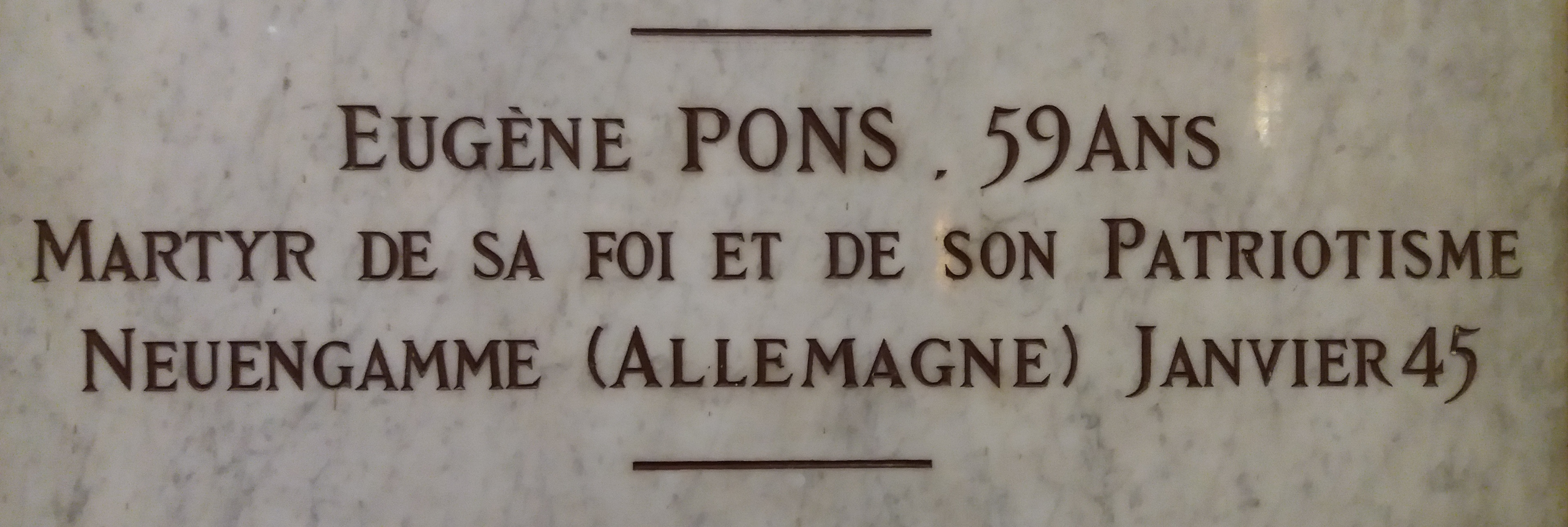 Monument aux morts 39-45, détail sur Eugène Pons.